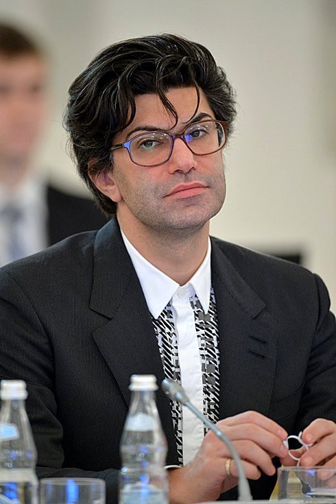 Николай Цискаридзе на заседании Госсовета и Совета по культуре и искусству